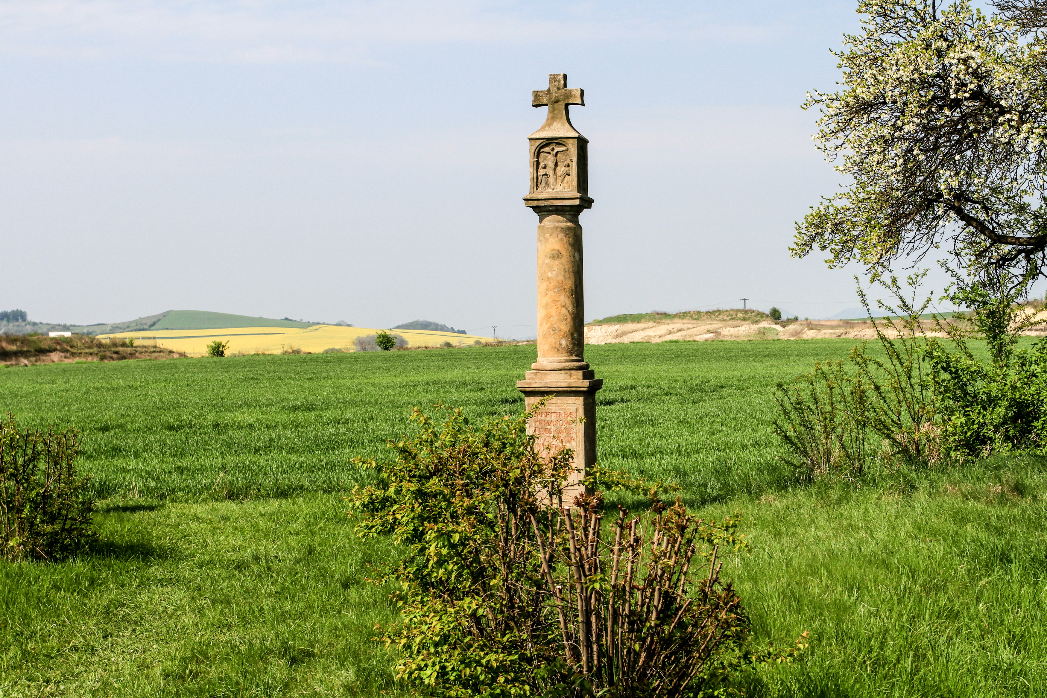 Boží muka (Libochovice), u hřbitova, Libochovice, Libochovice.